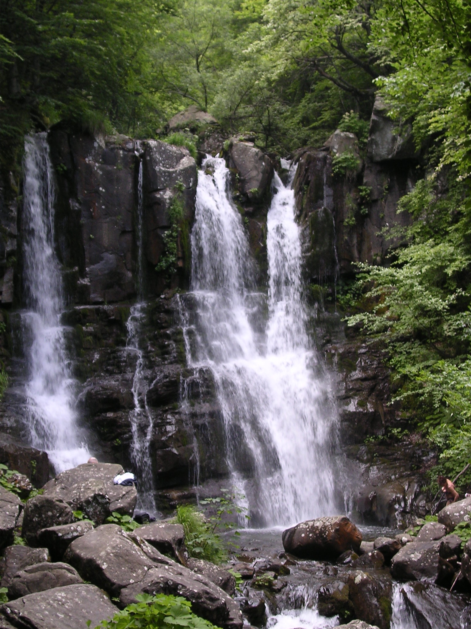 Dardagna falls, Corno alle Scale, Bologna/Modena (Italy)